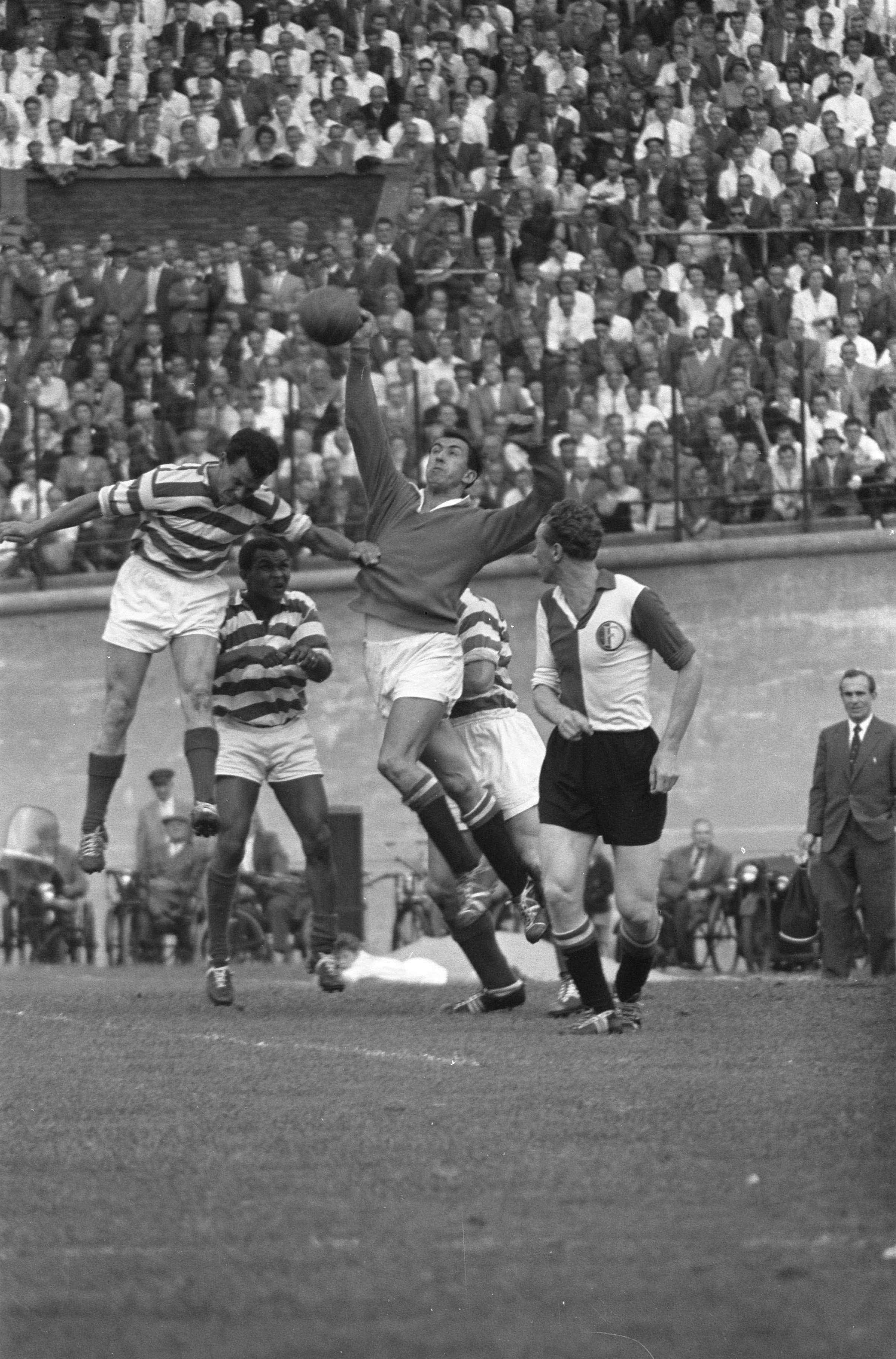 Collectie / Archief : Fotocollectie Anefo Reportage / Serie : [ onbekend ] Beschrijving : Blauw-Wit tegen Feyenoord 2-7, v.l.n.r. Magielse, Dagenaar Preters, Graafland en Klaassens Datum : 20 september 1959 Persoonsnaam : Dagenaar, Graafland, Klaassens Instellingsnaam : Feyenoord Fotograaf : Pot, Harry / Anefo Auteursrechthebbende : Nationaal Archief Materiaalsoort : Negatief (zwart/wit) Nummer archiefinventaris : bekijk toegang 2.24.01.05 Bestanddeelnummer : 910-6883